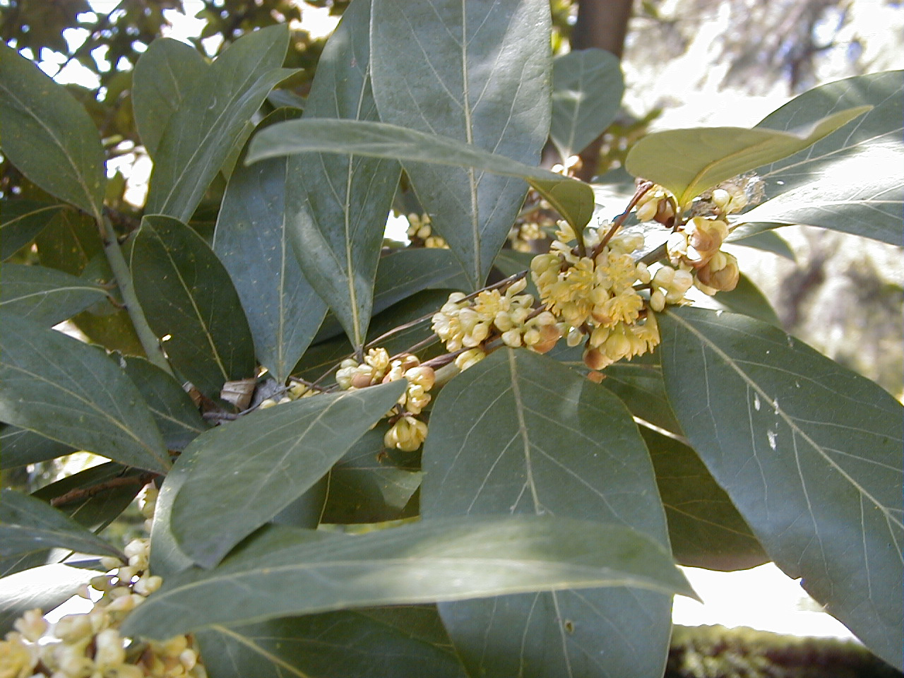 Laurus azorica. Real Jardín Botánico, Madrid, España.